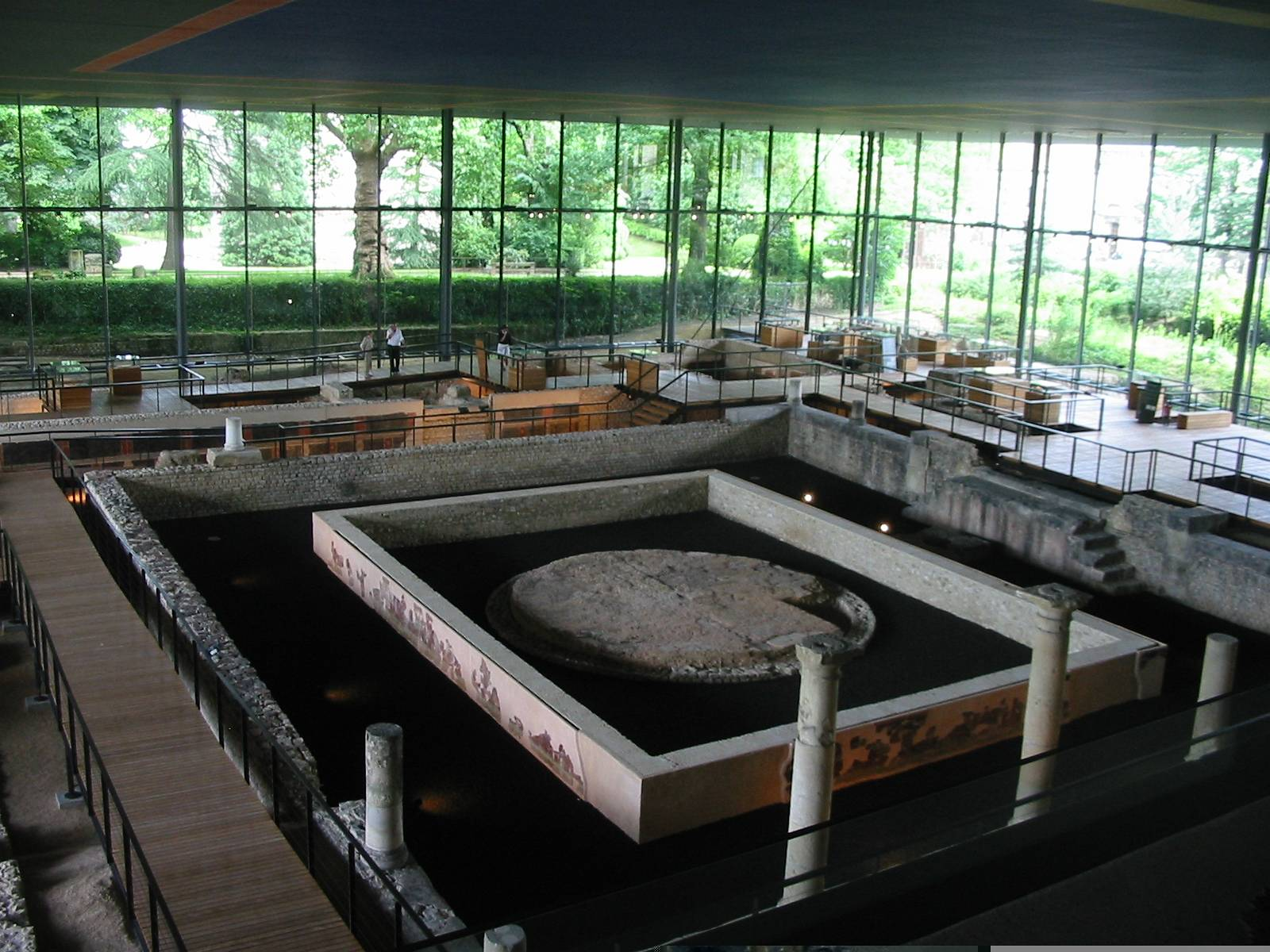 Intérieur du musée archéologique de Vésone, Périgueux, France